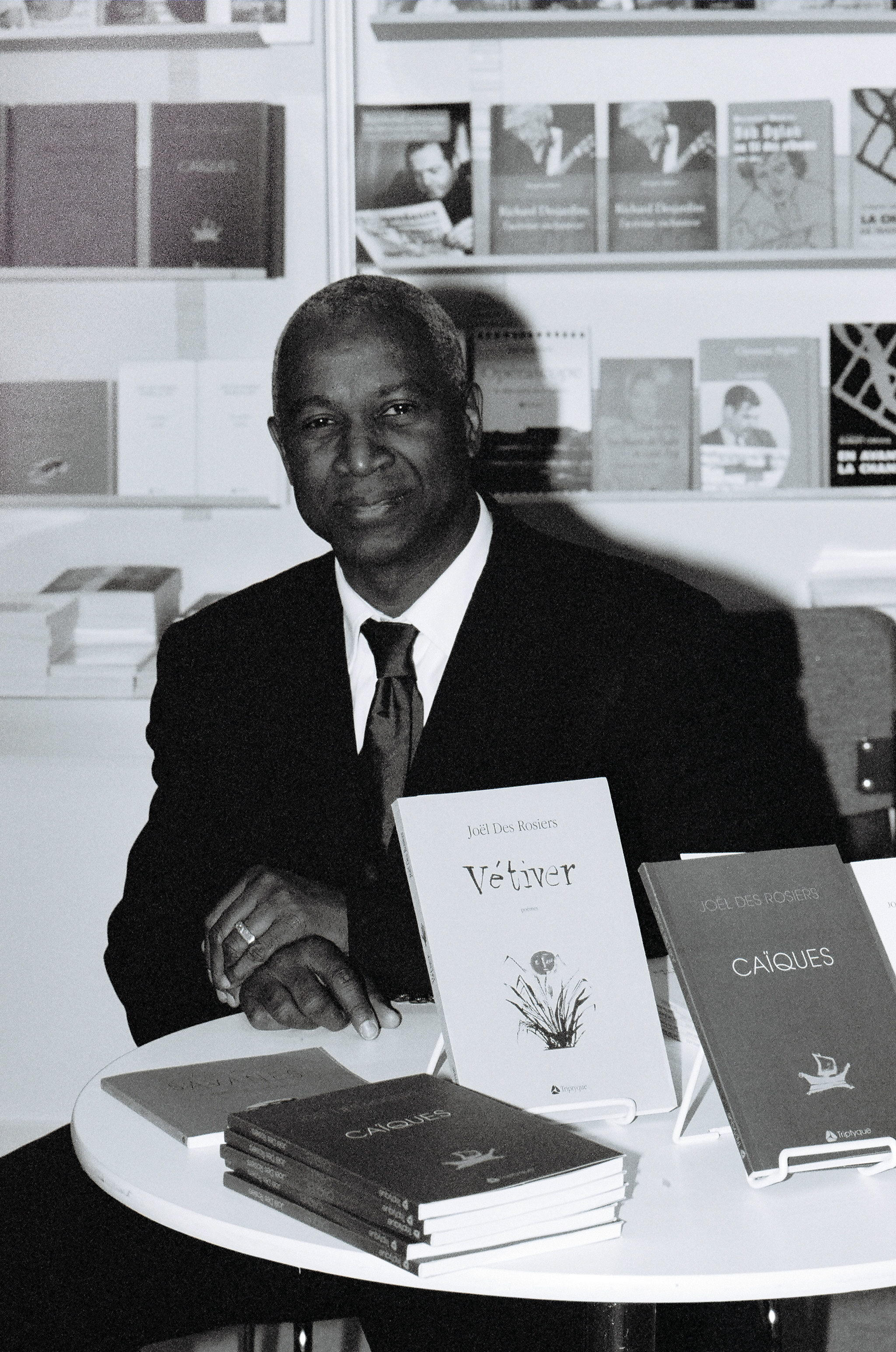 Salon du Livre Montréal 15-11-2007.jpg